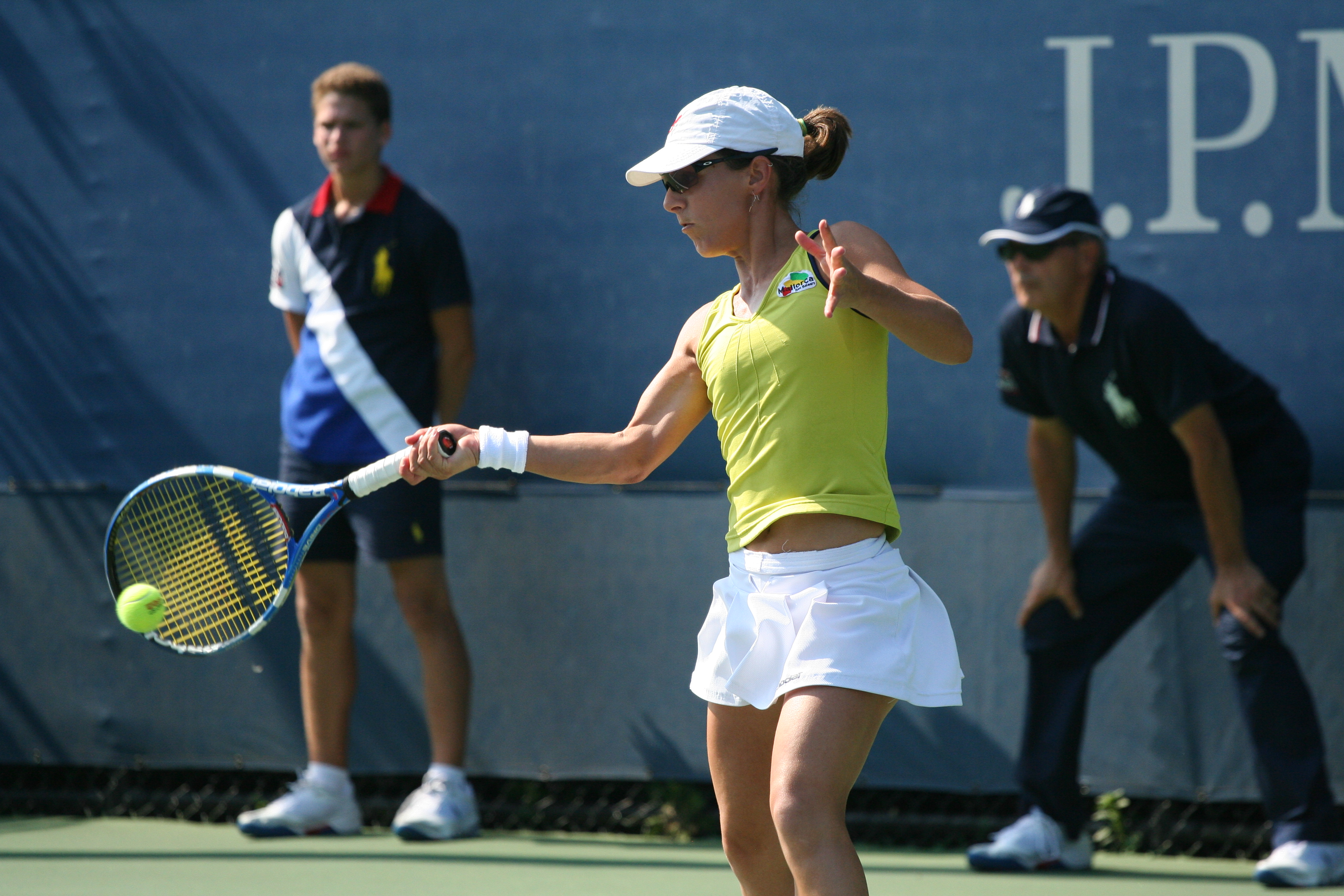 U.S. Open, Aug. 31, 2010